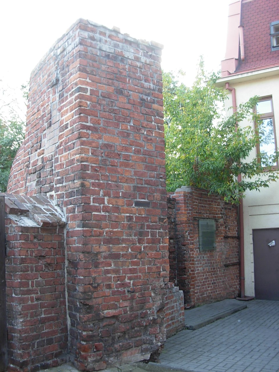 Mury miejskie Bydgoszczy - częściowo zachowana baszta